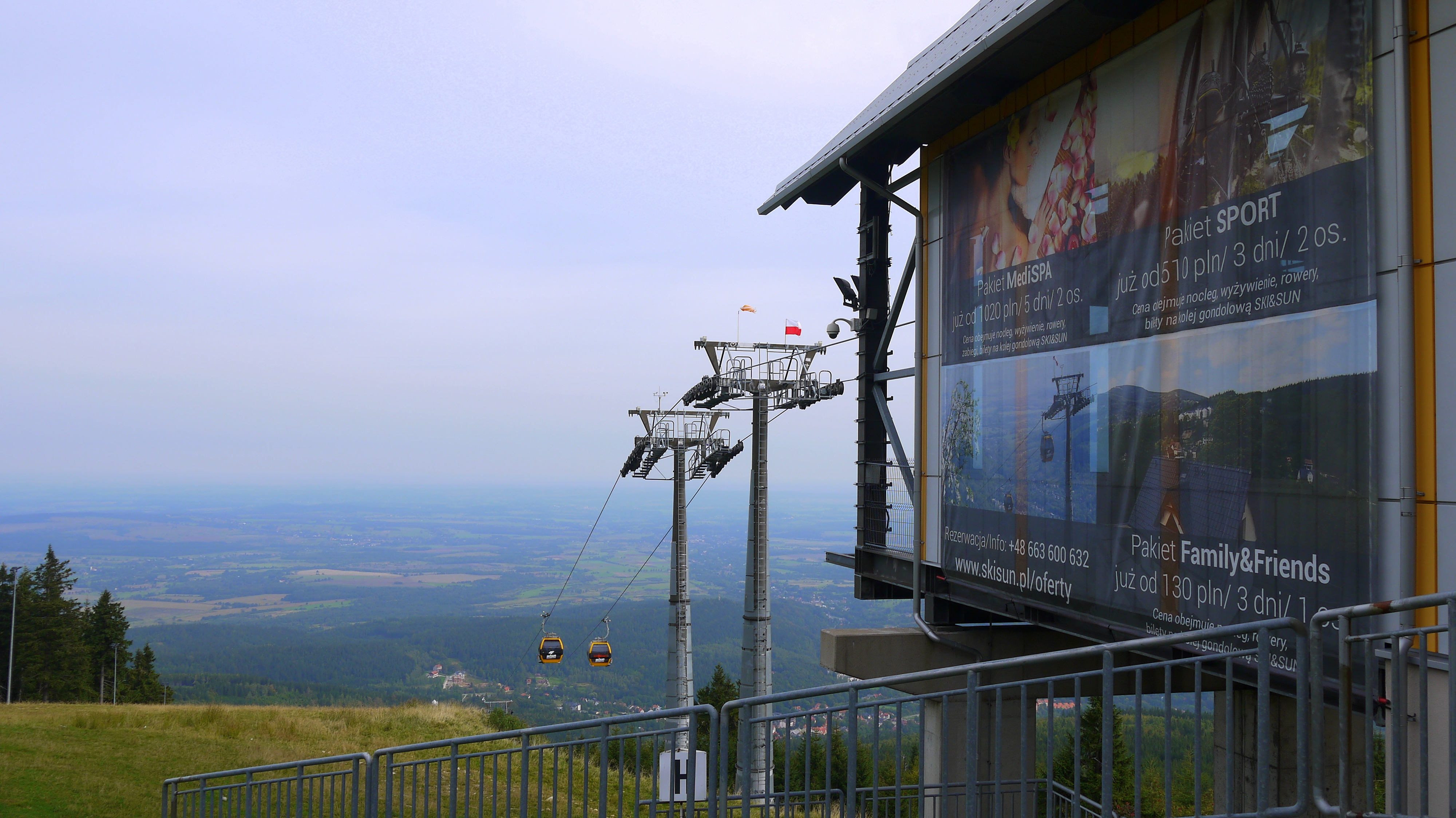 Świerardów Zdrój- Górna Stacja